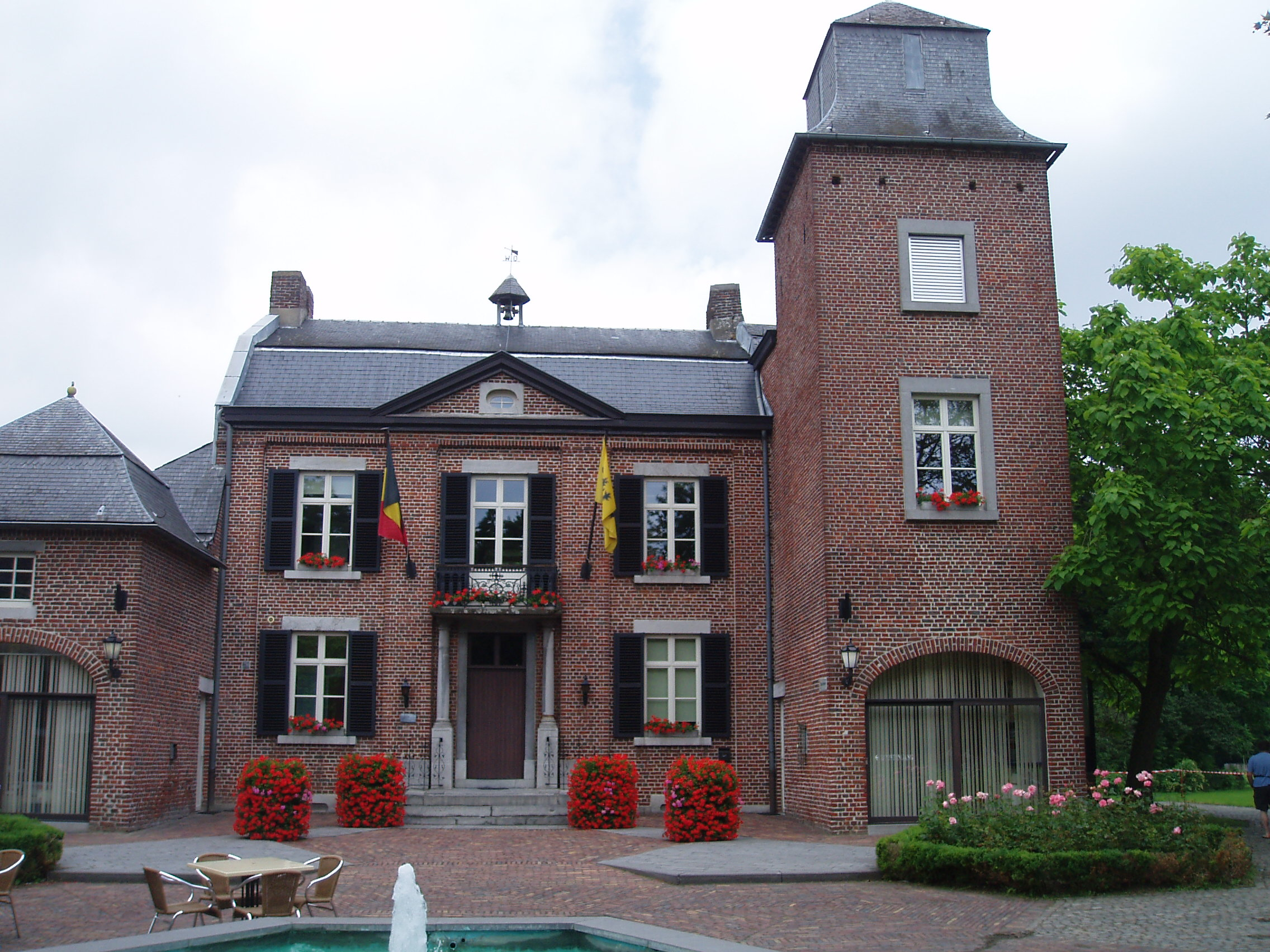 Kasteel de Pierpont - stadhuis 2013 - voorzijde